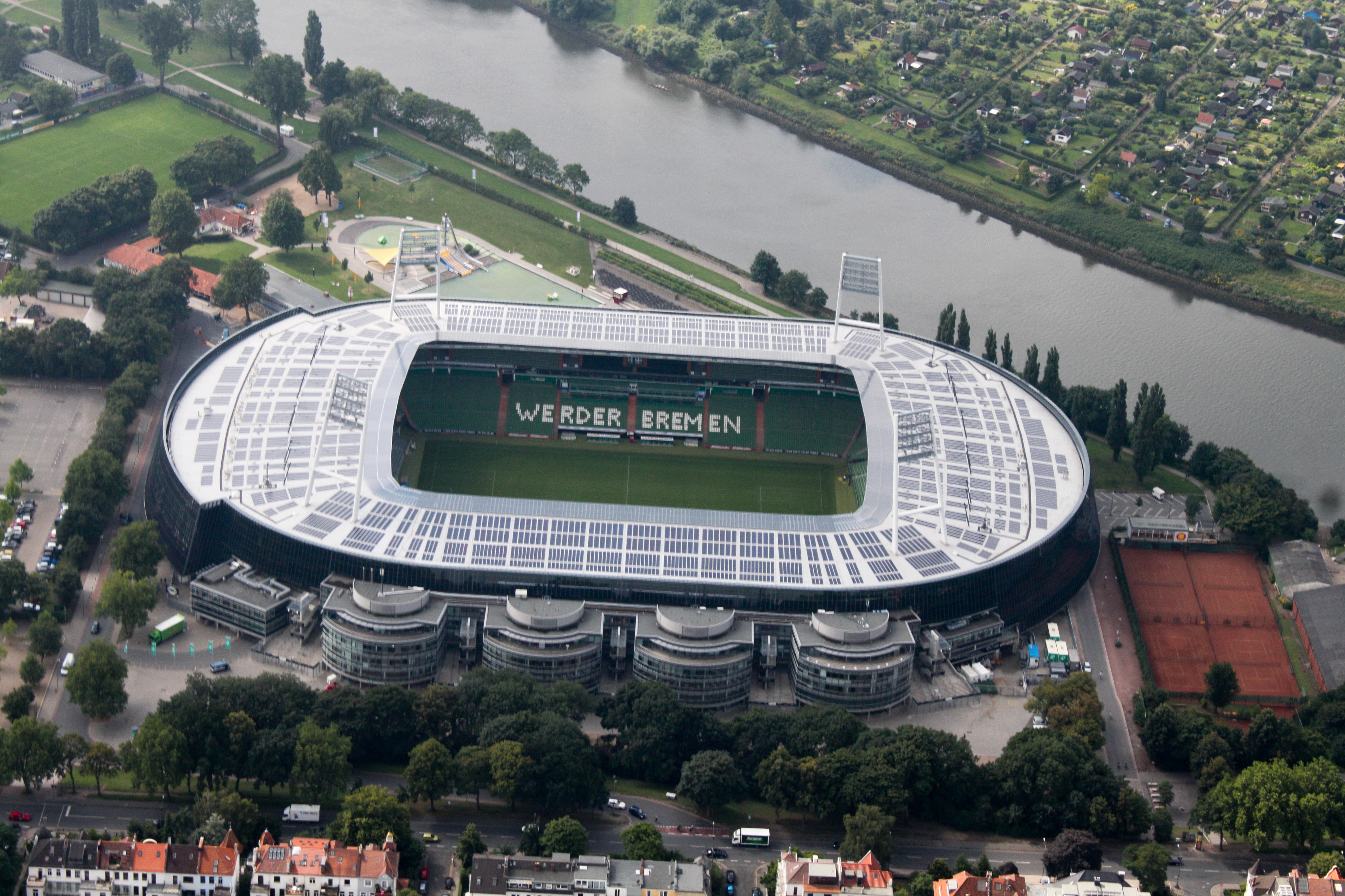 Fotoflug: Airport Bremen - Kattenturm - Krankenhaus LdW - Ochtumpark - Brinkum Nord - Huckelriede - Weserstadion - Peterswerder (identische Bildbeschreibung für File:2012-08-08-fotoflug-bremen zweiter flug 0301.JPG bis File:2012-08-08-fotoflug-bremen zweiter flug 0406.JPG; alle mit GPS-Koordinaten